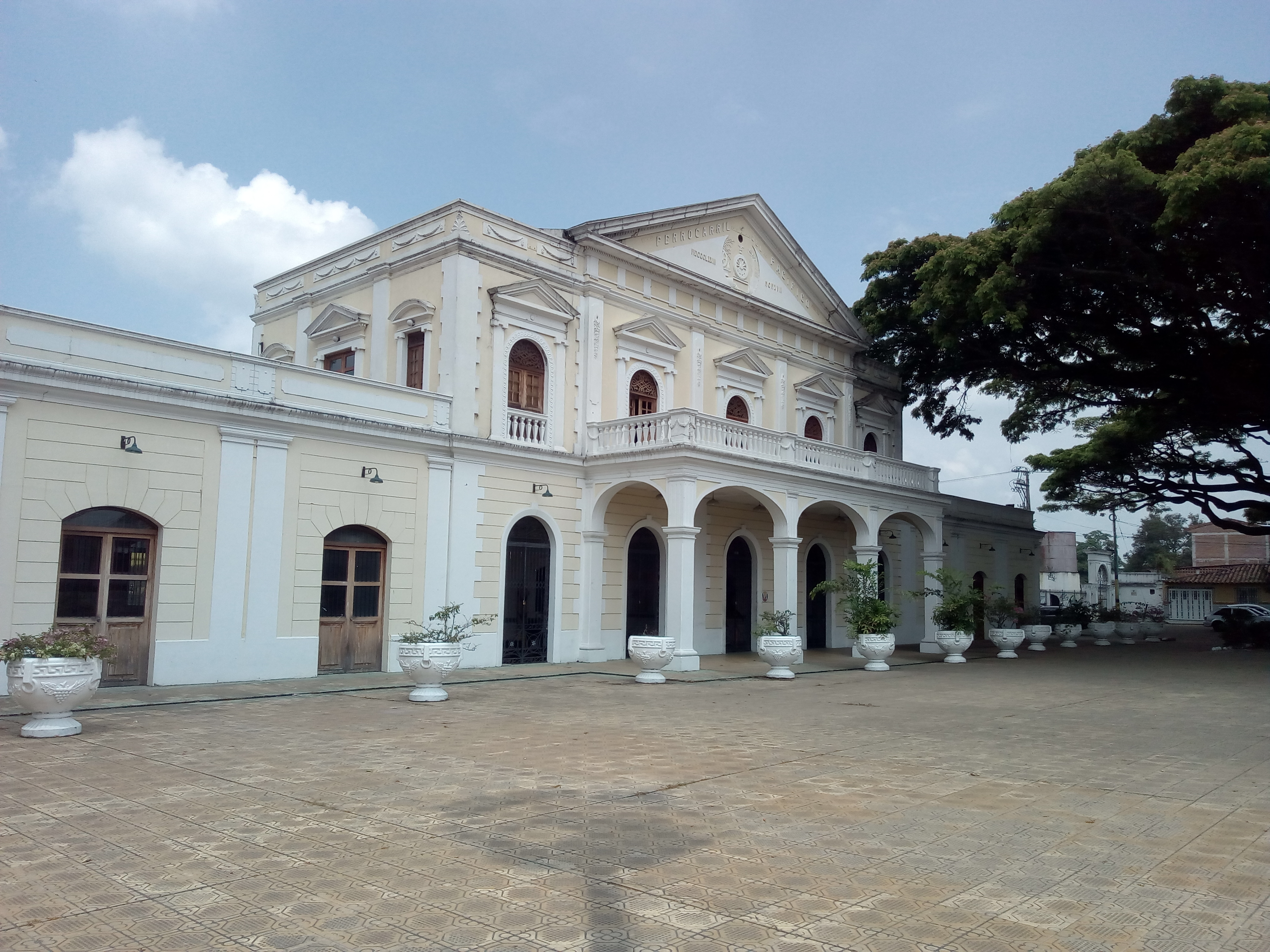 Tomada desde el sector conocido como "La estación".